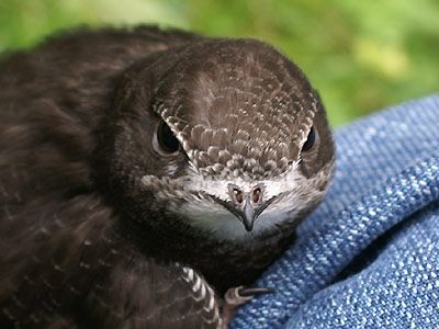 Mauersegler - Apus Apus, ein Jungvogel der noch nicht fliegen konnte.